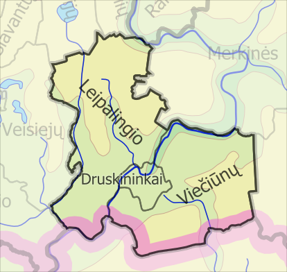 Druskininkų savivaldybės seniūnijos (lt::image:LietuvosSeniunijos.png)